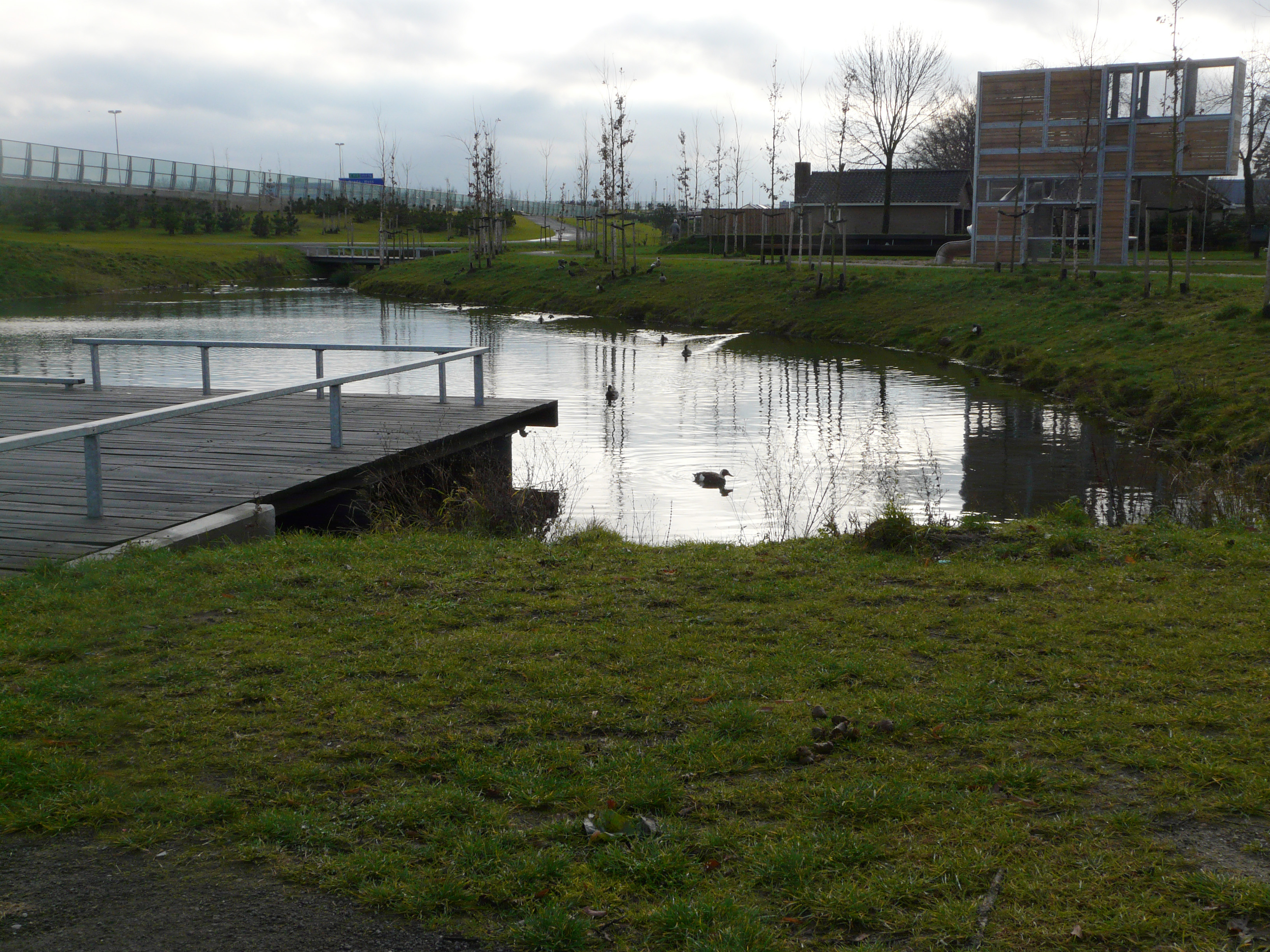 Park Overbos in Prinsenbeek, Breda